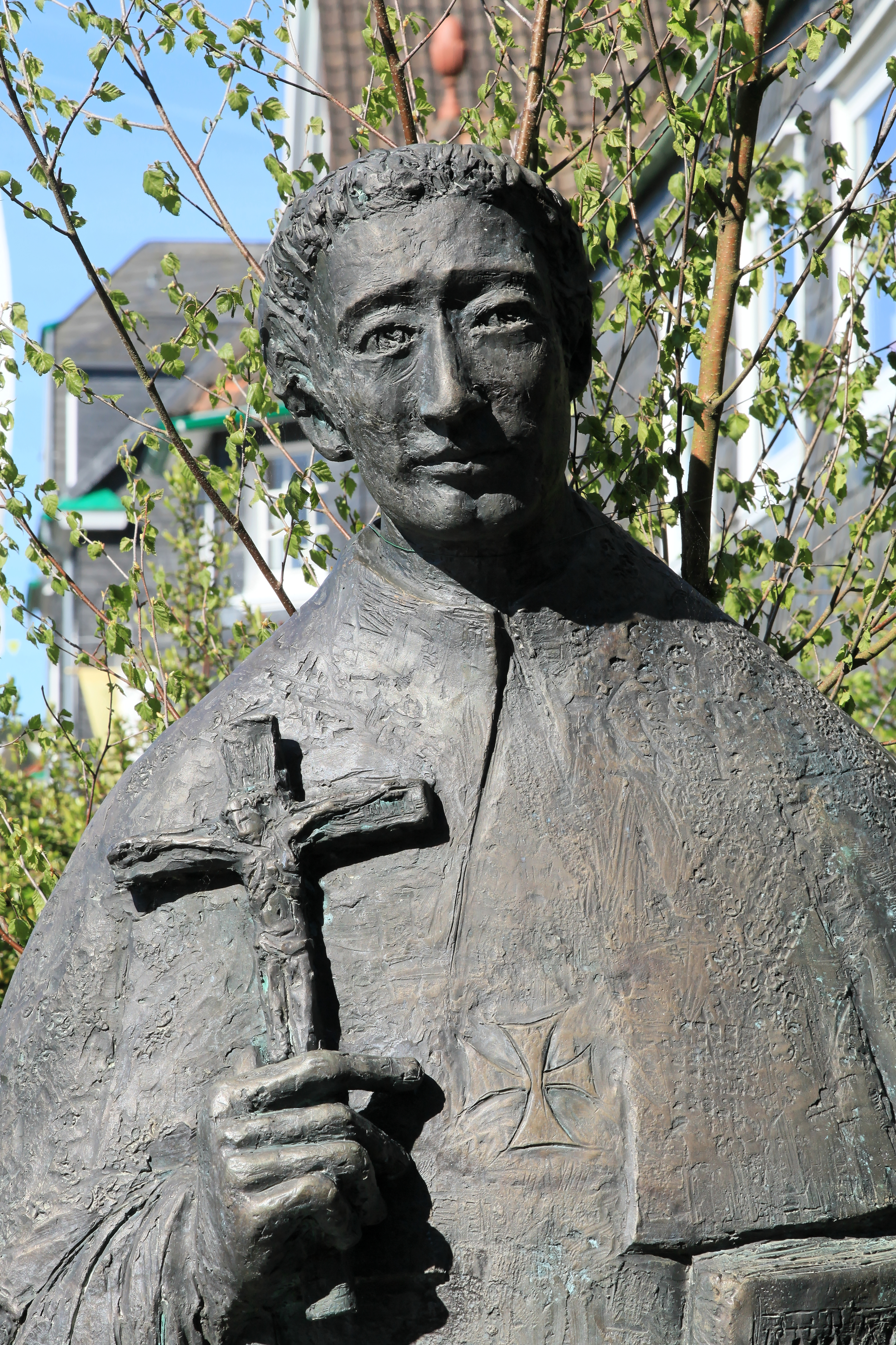 Statue des Theodorus von Celles, Beyenburger Freiheit in Wuppertal